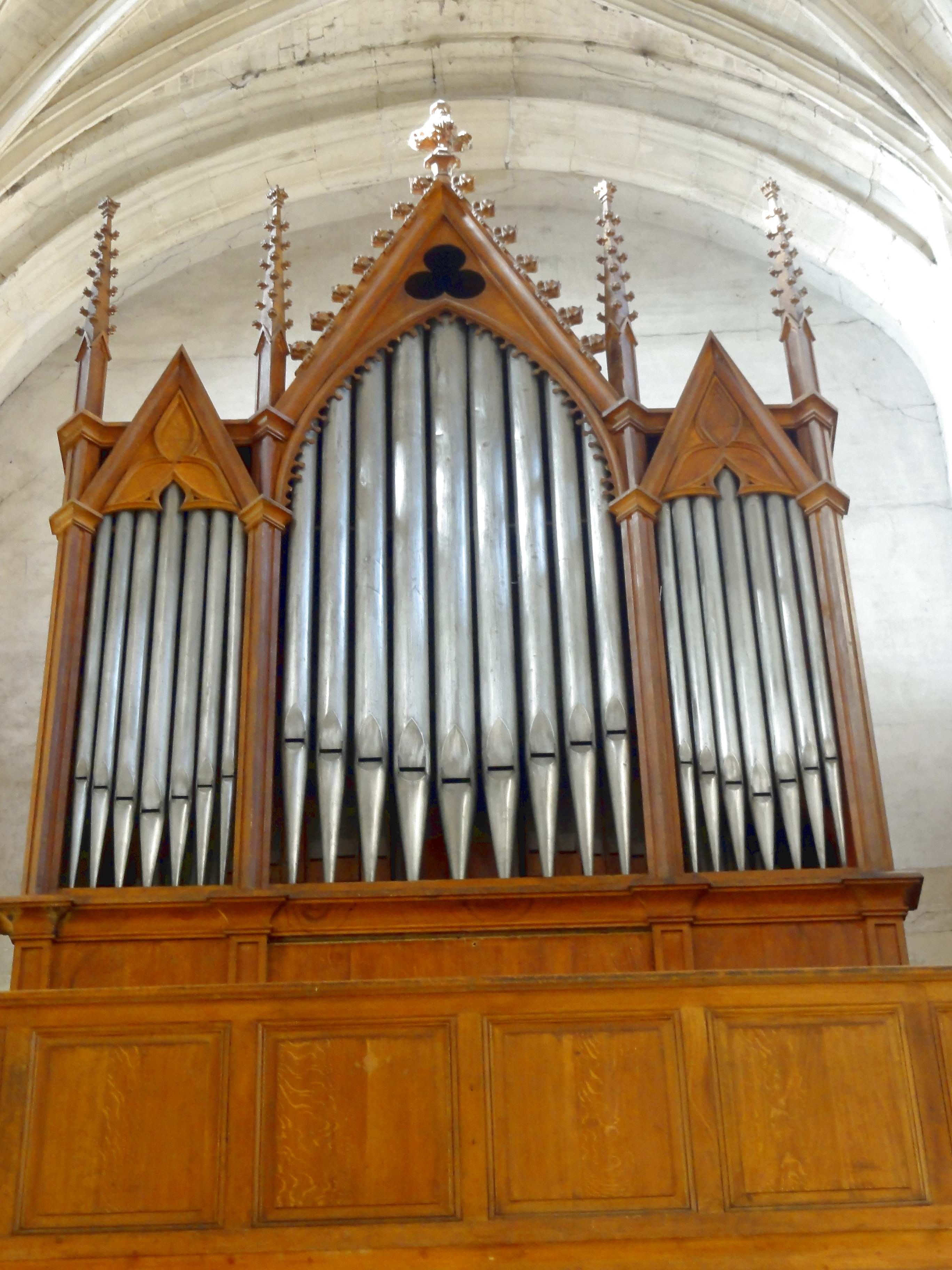 Orgue de tribune. Seule la partie instrumentale de l'instrument construit par Daublaine & Callinet en 1840 est classée, modifiée en 1870 par les frères Eugène et John II Abbey.